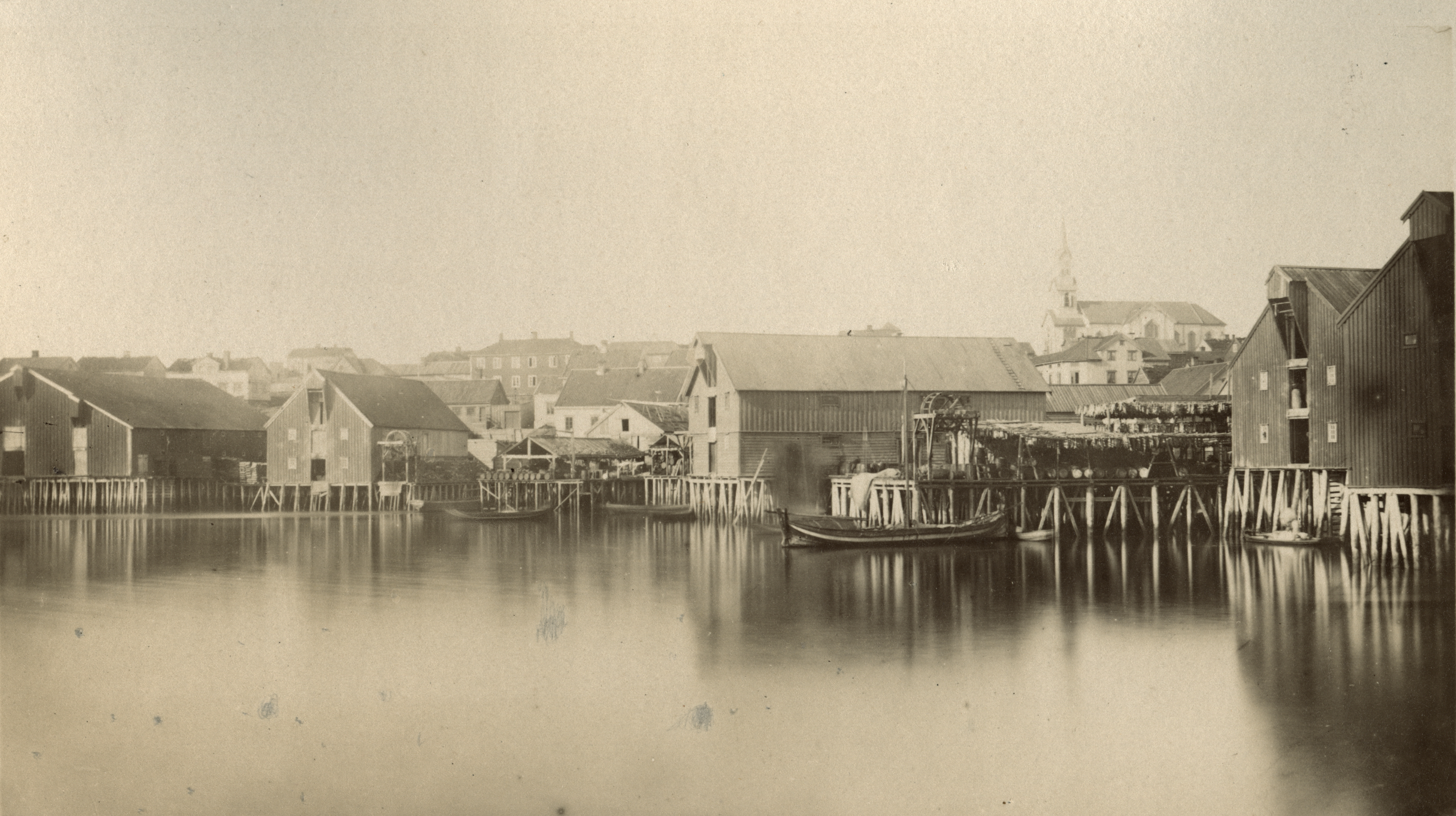 Vadsø i Vadsø, Finnmark No. 7. Vue de Vadsö